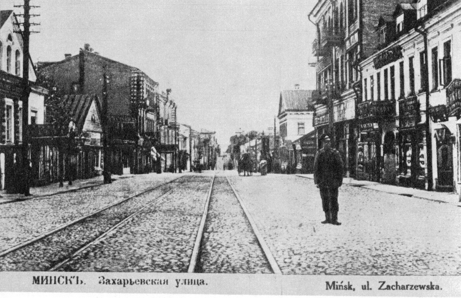 Беларуская (тарашкевіца): Від вуліцы захар'еўскай у Менску. Пачатак XX ст.